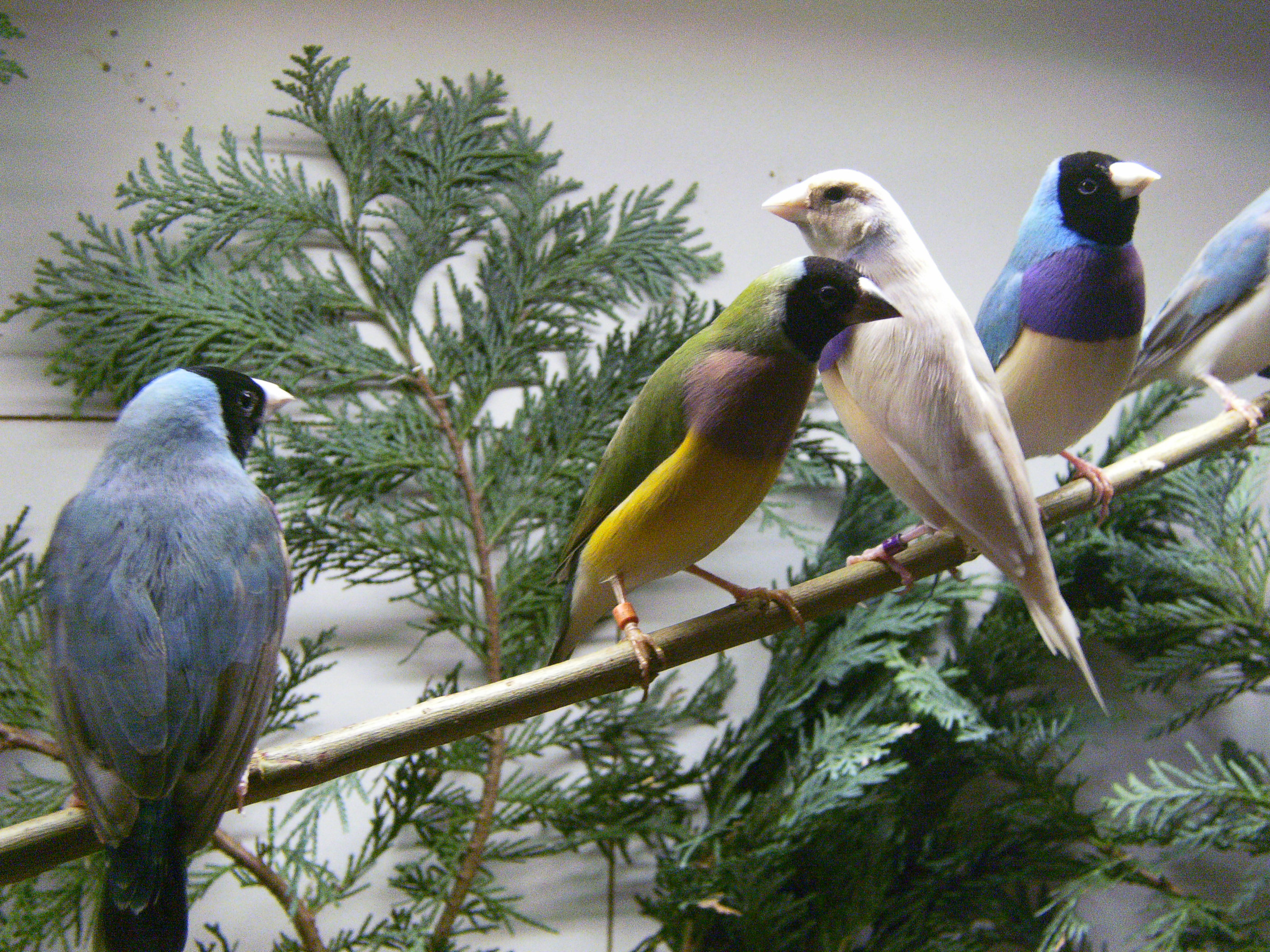 Gouldamadinen Farbmutationen